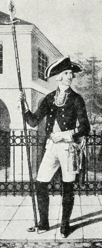 Обер-офицер Казанского мушкетерского полка (1797—1801). Это изображение было использовано для иллюстрирования статьи «Казанский, 64-й пехотный, полк» опубликованной в одиннадцатом томе «Военной энциклопедии», который был издан книгоиздательским товариществом И. Д. Сытина в 1913 году в столице Российской империи городе Санкт-Петербурге.